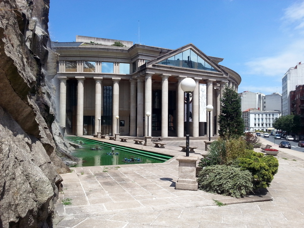 Palacio da Ópera (A Coruña)